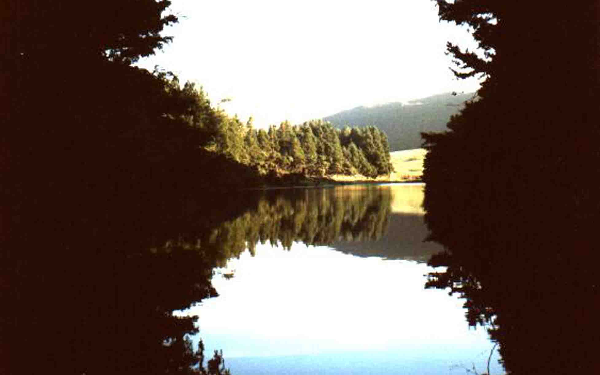 Chã das Lagoinhas, vista, Angra do Heroísmo, ilha Terceira, Açores, Portugal.